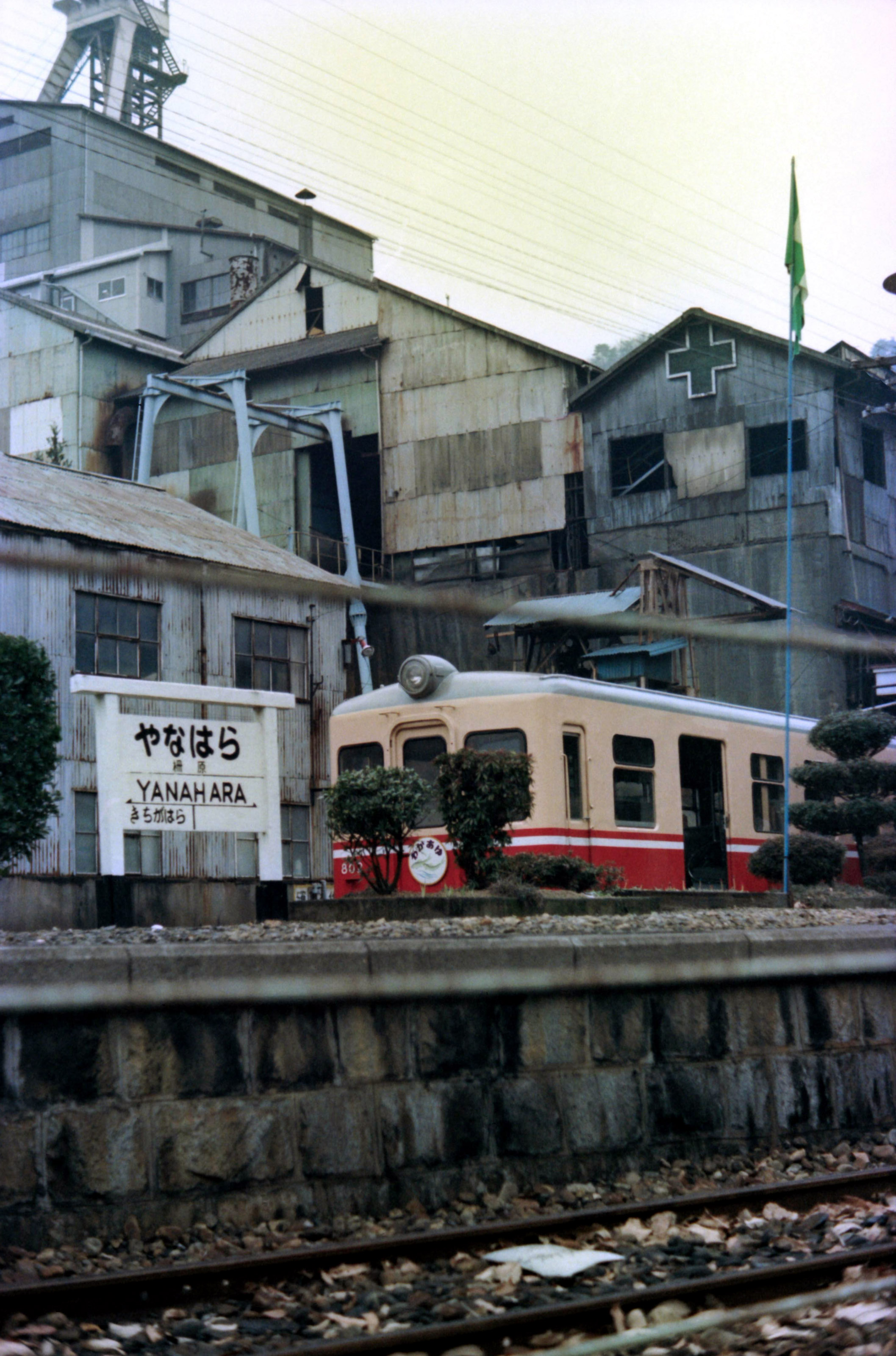 片上鉄道 柵原駅 駅名標 ホーム